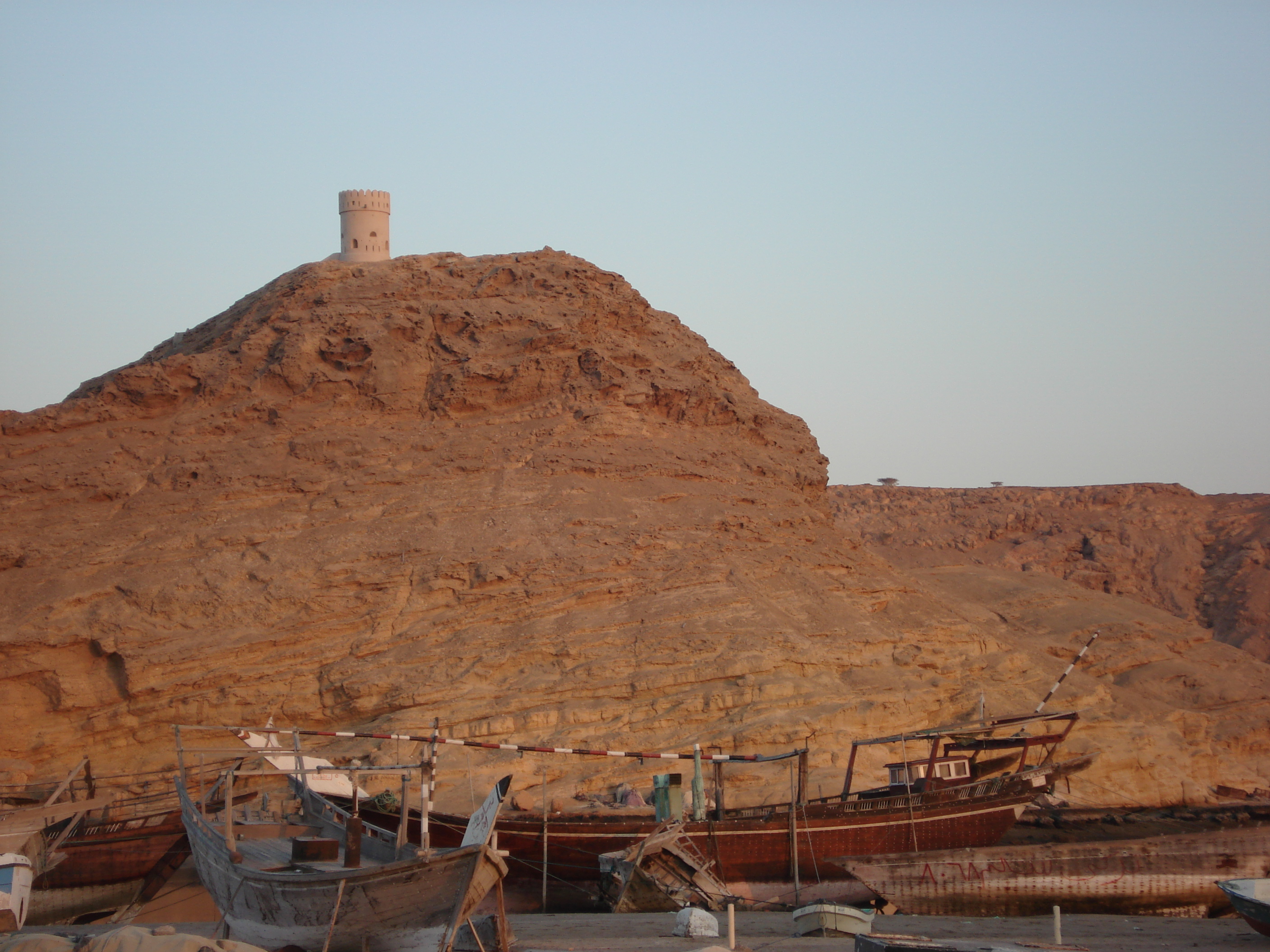 Sur, Oman